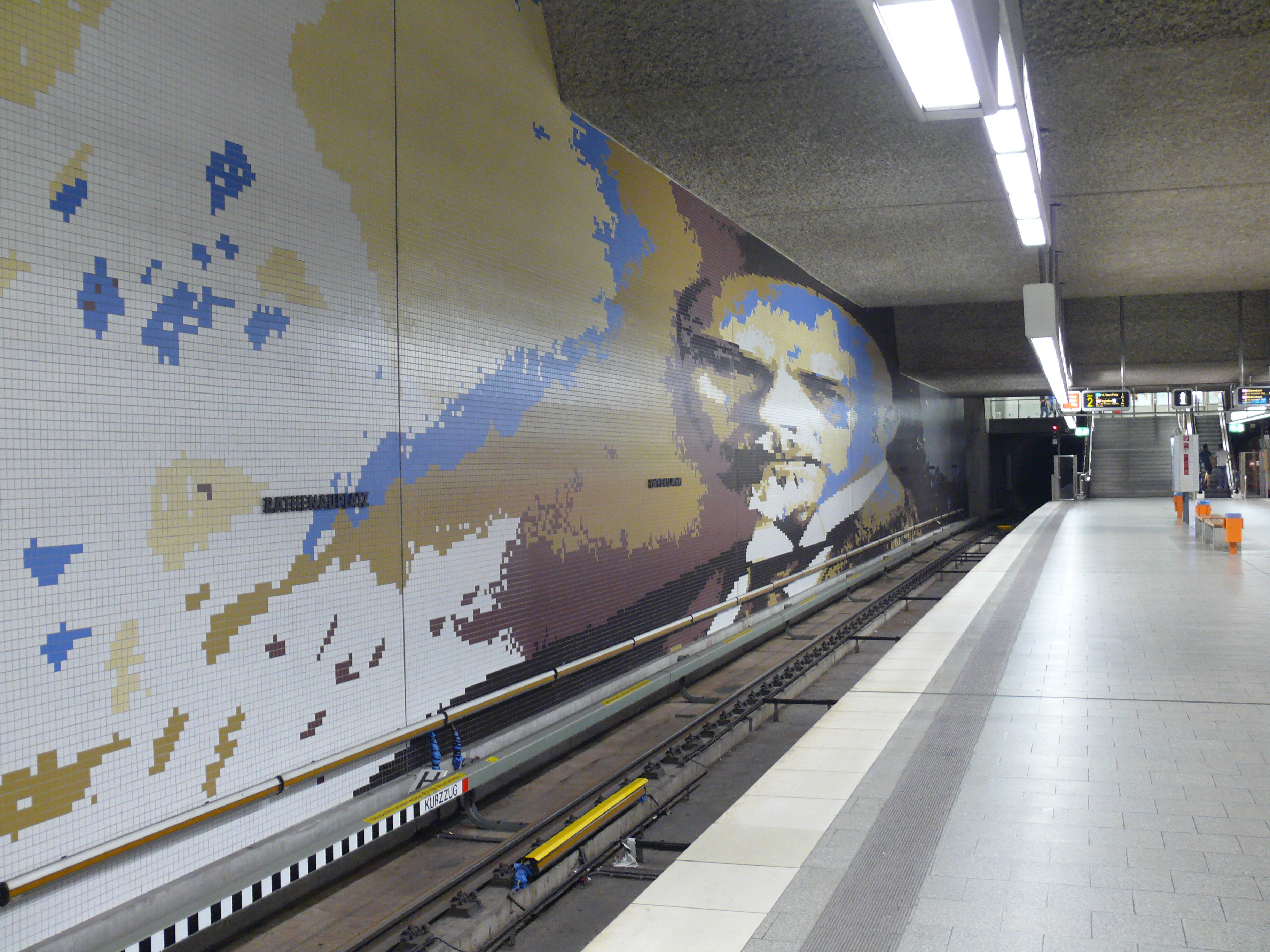 Mosaik von Walter Rathenau auf der Bahnsteigebene am U-Bahnhof Rathenauplatz in Nürnberg. (Künstlerische Gestaltung 1990 von Gregor Hiltner, zeigt Walther Rathenau)